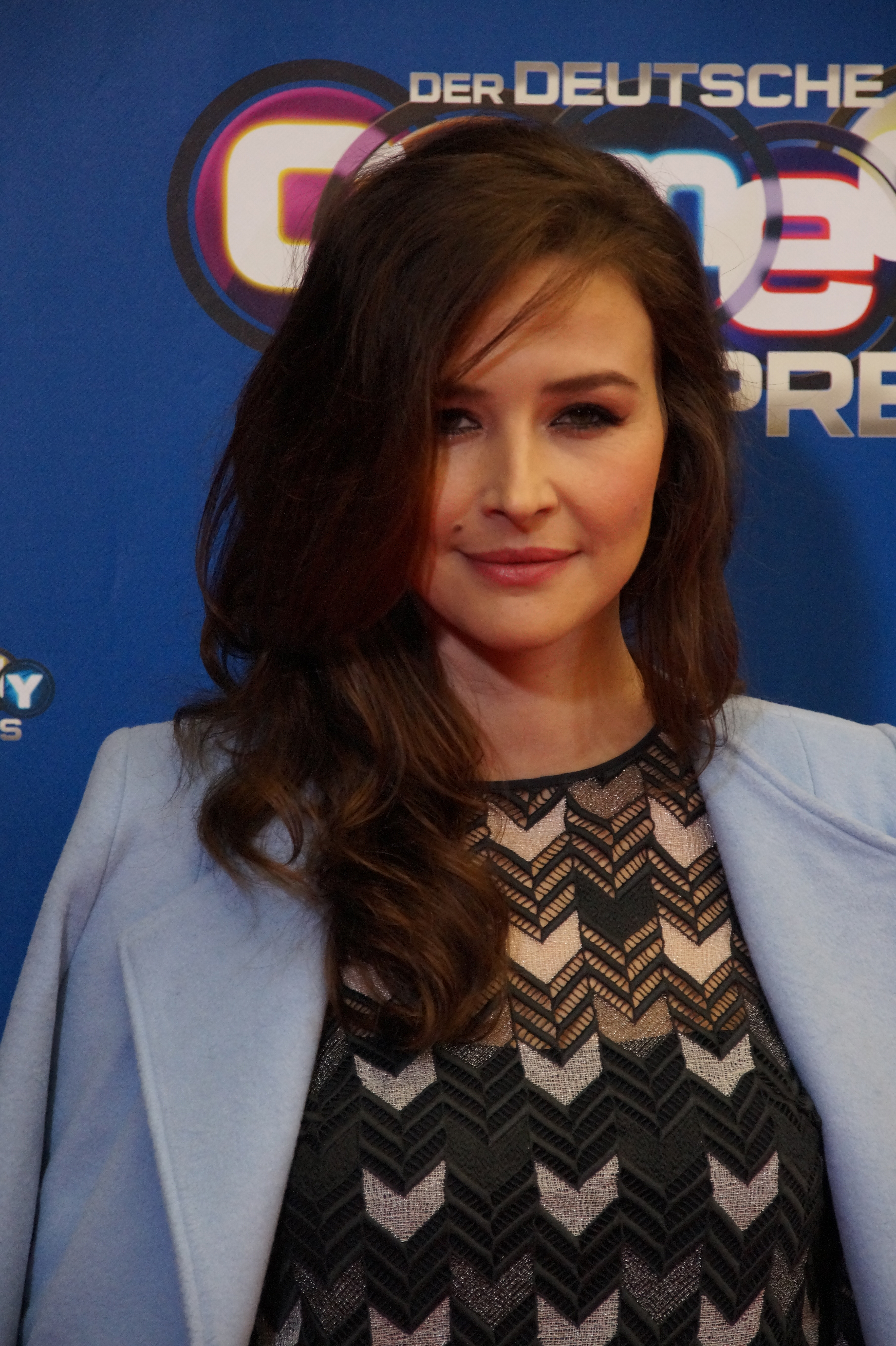 Katrin Bauerfeind beim Comedypreis 2016, im Oktober 2016, Köln.